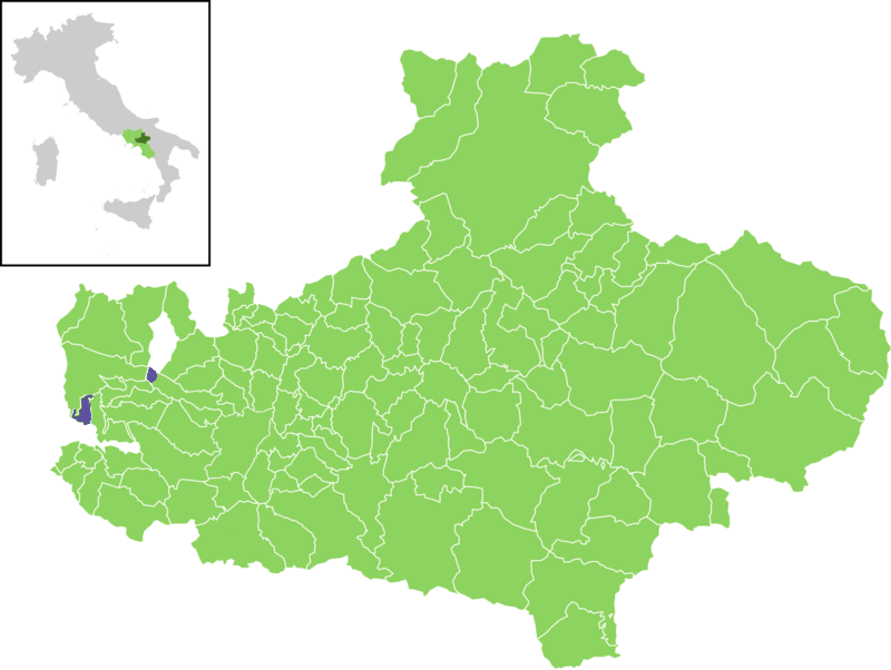 Posizione del comune all'interno della provincia di Avellino